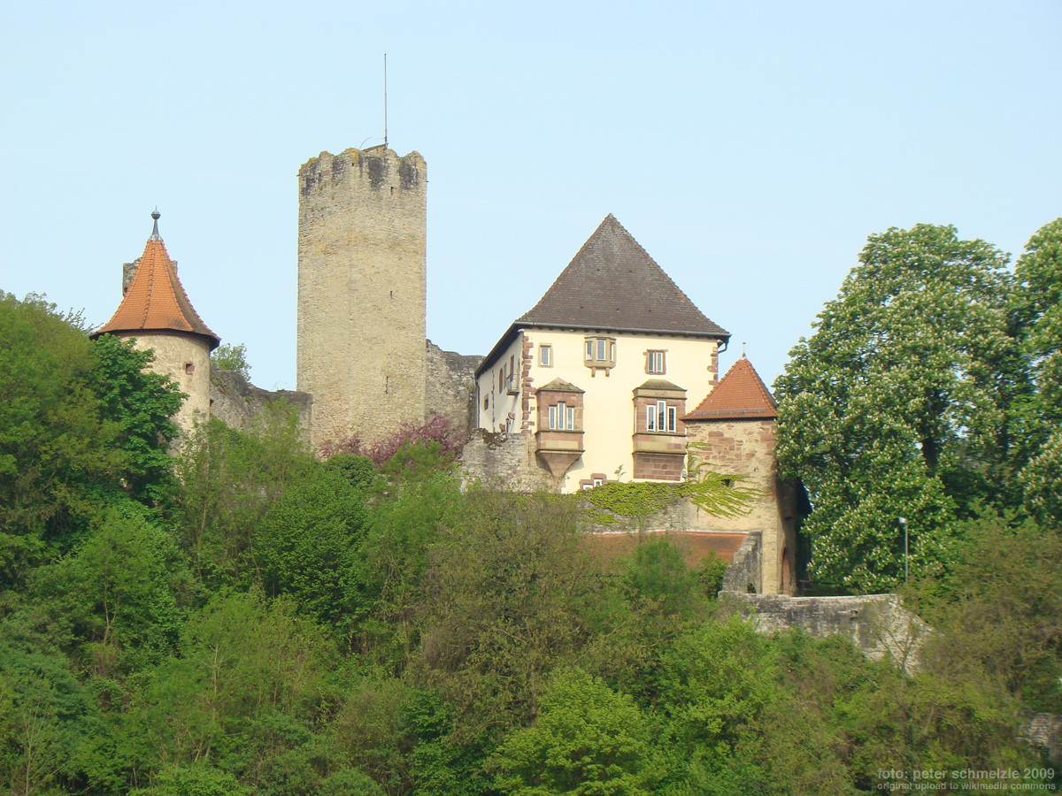 Veste Neidenstein